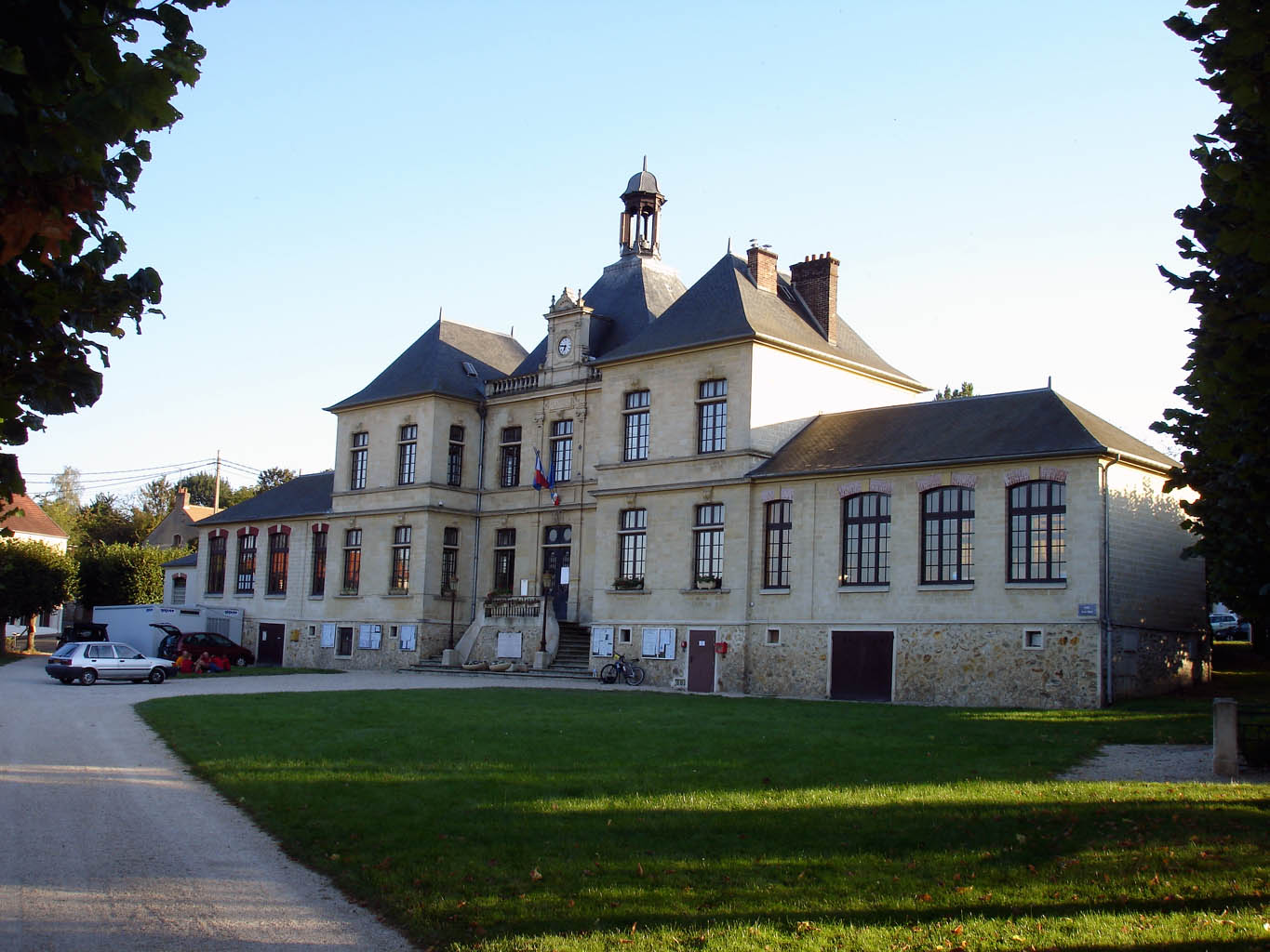 Mairie de Villiers-Adam (Val-d'Oise), France